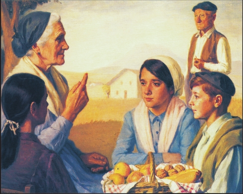 “Amonatxoaren ipuina”, Kaperotxipi